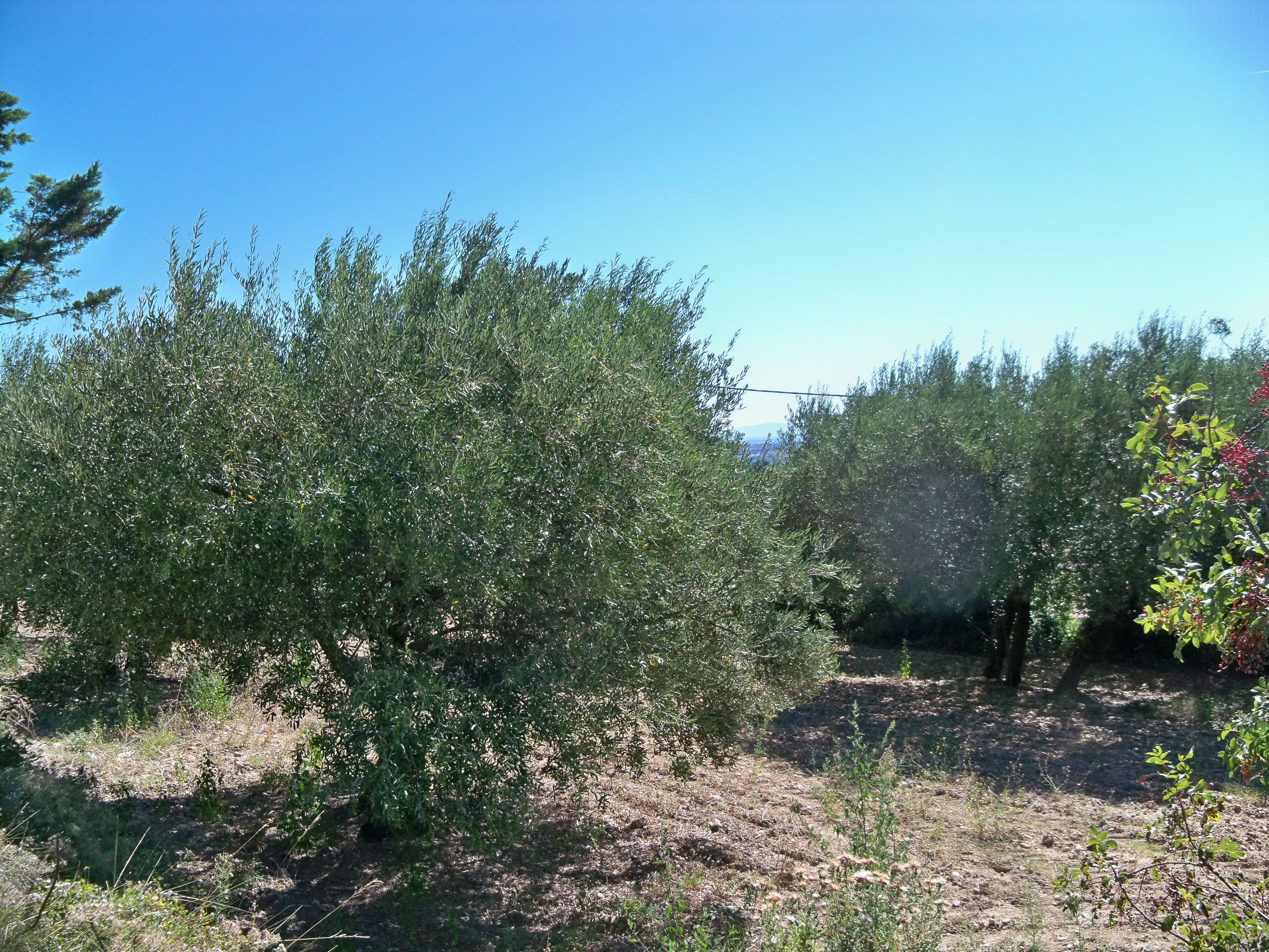 Oliveraie à Rochefort du Gard